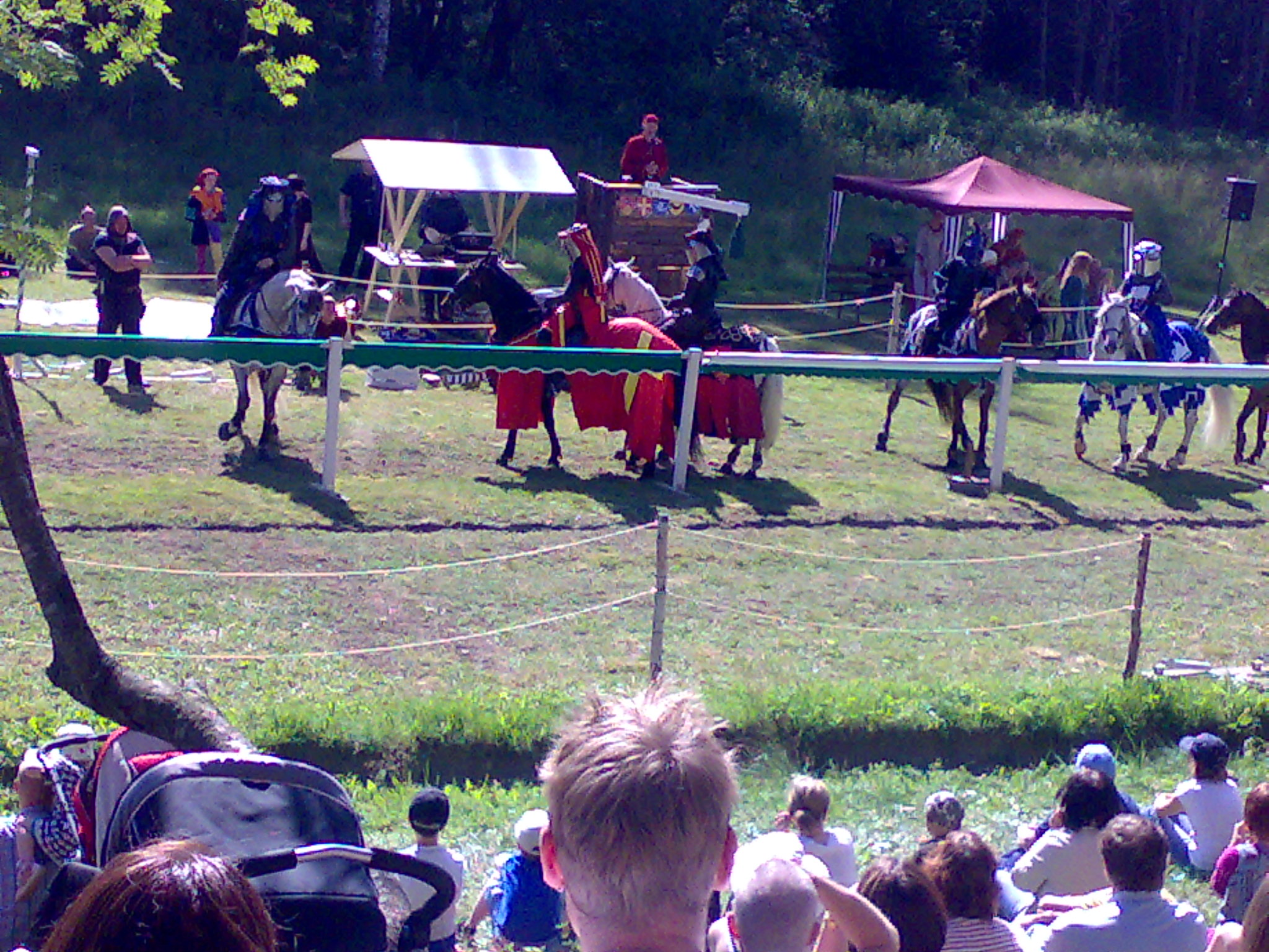 Raaseporin linnan keskiaikatapahtuma kesällä 2008